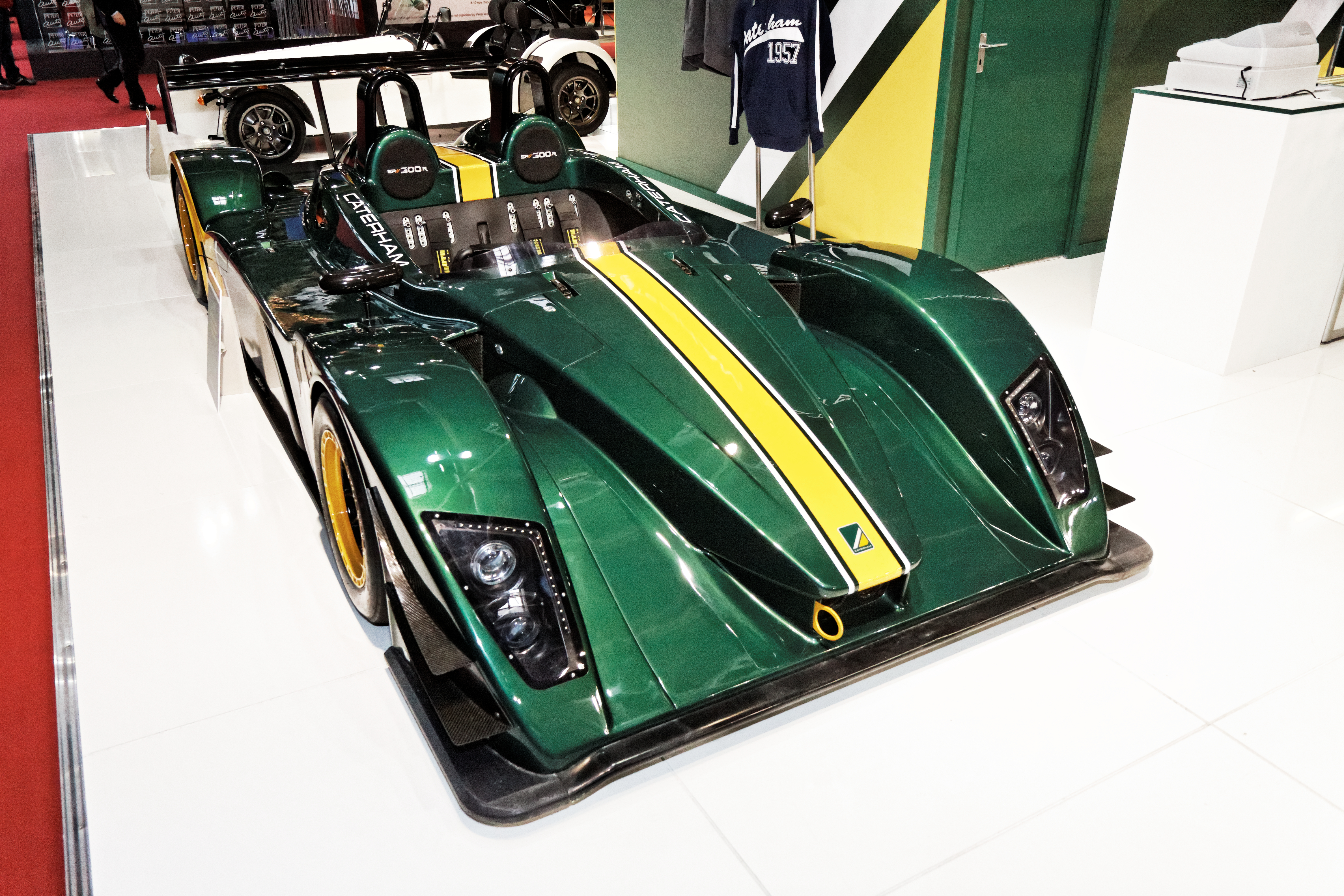 Une Caterham SP 300.R présentée lors du salon Retromobile 2013.